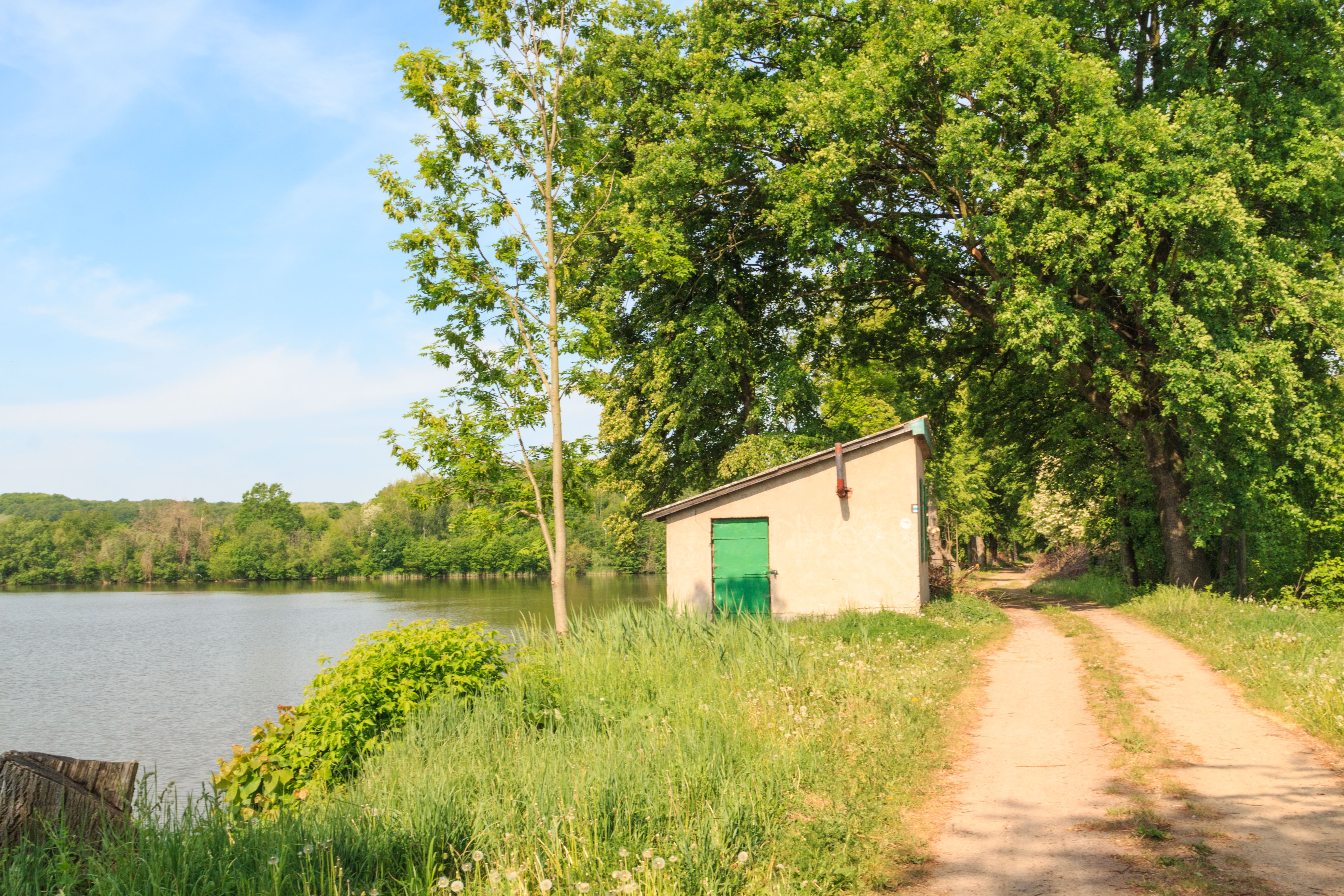 Rybník Pazderna u Zdechovic Project: Vodstvo.